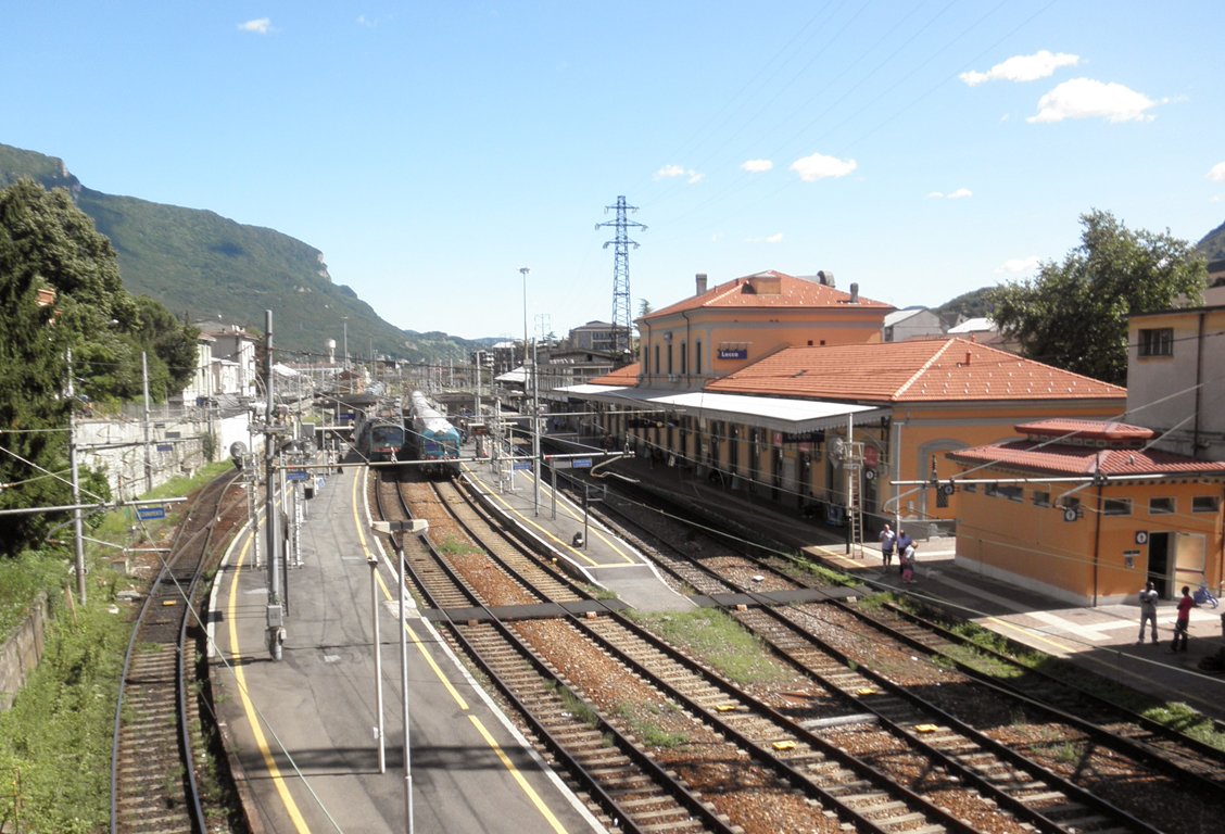 Stazione ferroviaria di Lecco